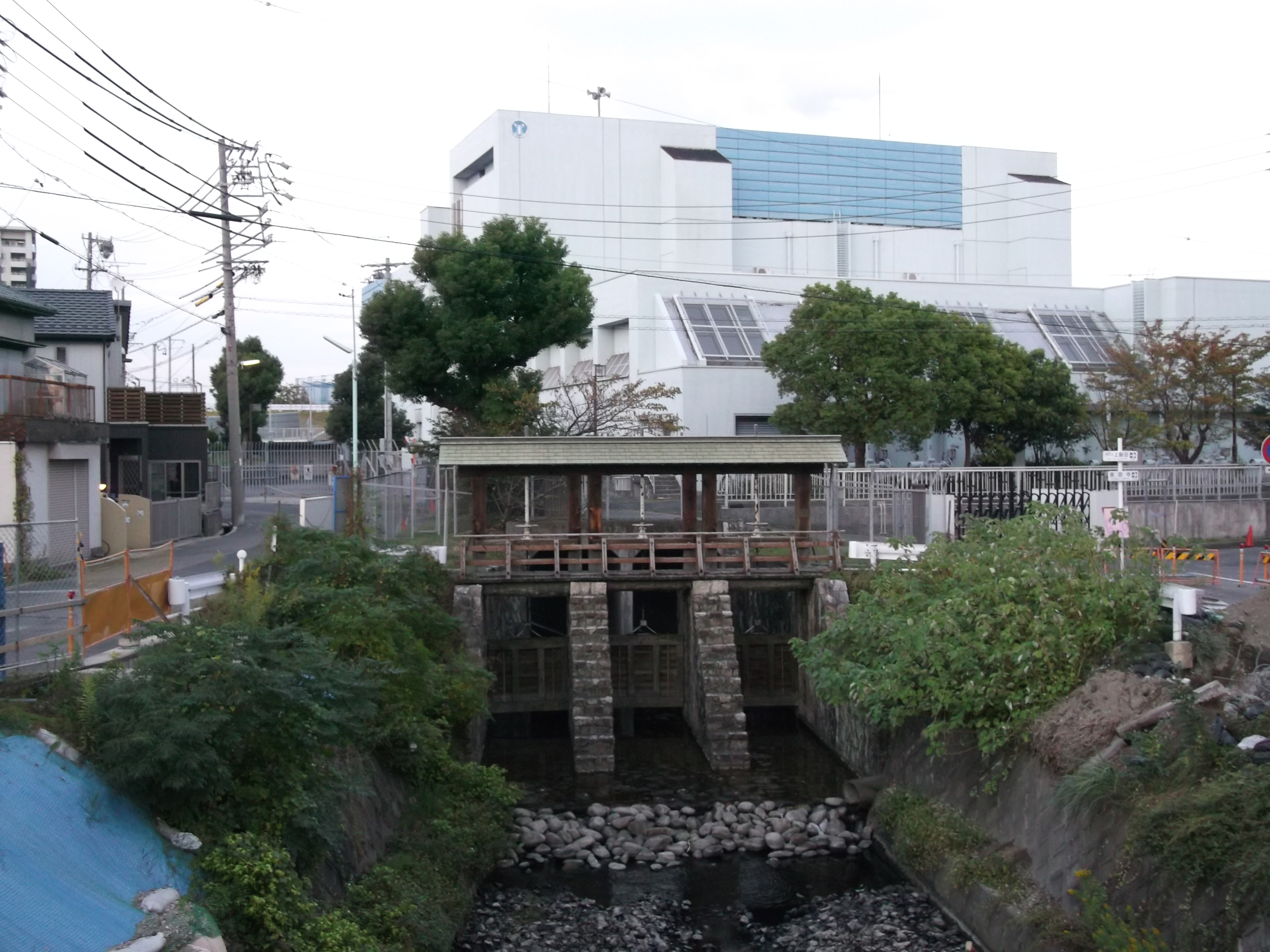 名古屋市北区の黒川樋門